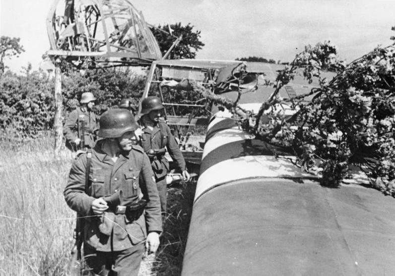 Lastensegler - am Boden zerschellt. Viele bei der anglo-amerikanischen Invasion eingesetzte Lastensegler wurden von unserer Flak abgeschossen oder zerschellten bei der Landung am Boden. Dieser Lastensegler ging zwischen deutschen Truppen nieder und rannte gegen einen Heckenwall. Einige Insassen waren tot, der Rest konnte von unseren Soldaten sofort überwältigt und gefangen genommen werden. [Sommer 1944] Information added by Wikimedia users.This is a Waco glider, NOT a Horsa!